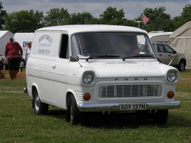 White van man, Bolnhurst